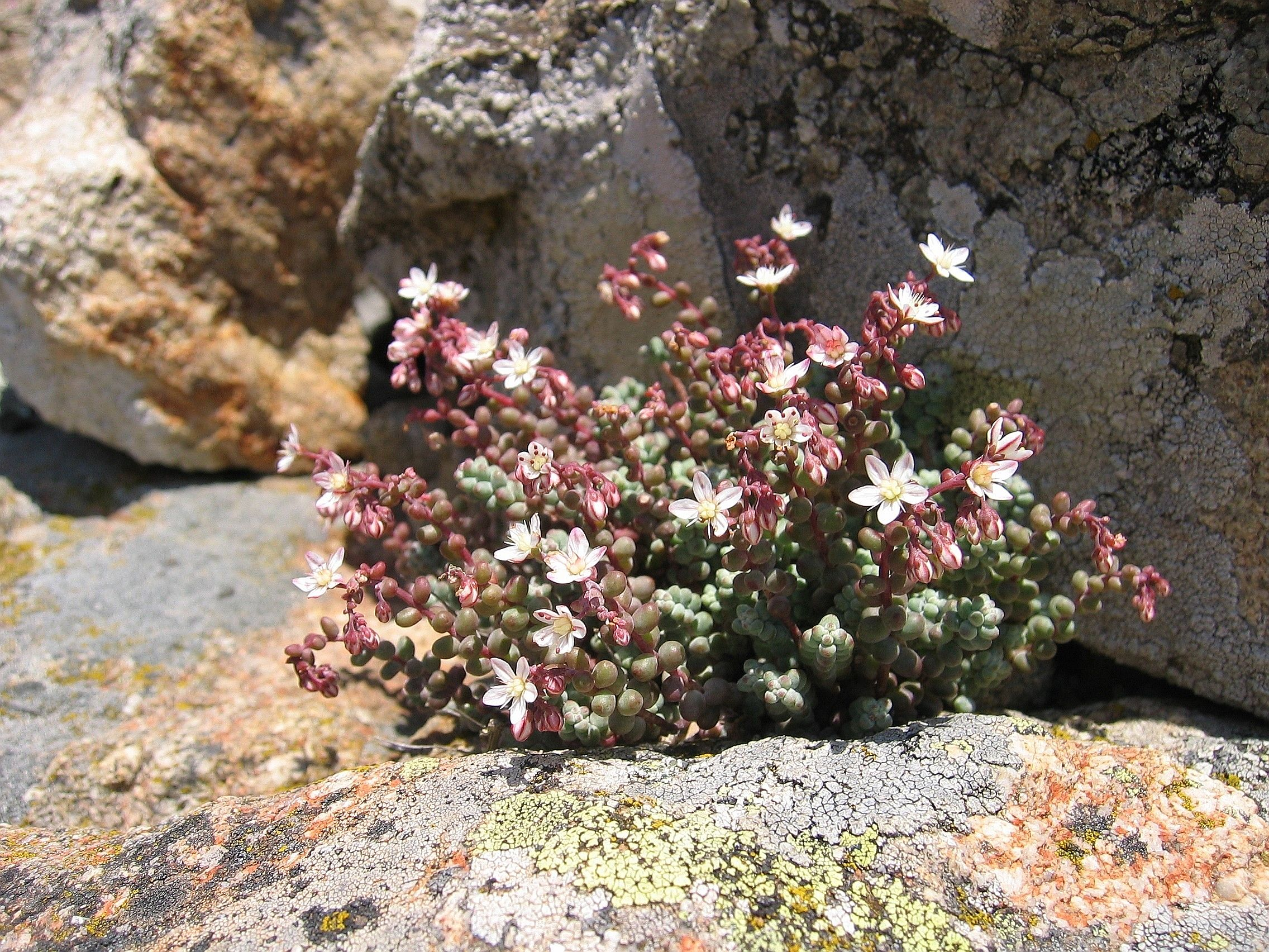 Sedum brevifolium, near Monte Tolu ~1300, Corse